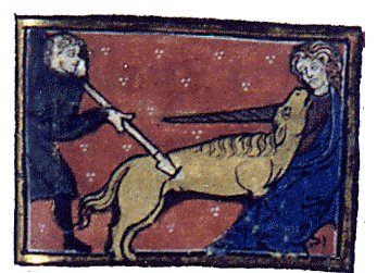 Licorne dans le Bestiaire d’amour de Richard de Fournival